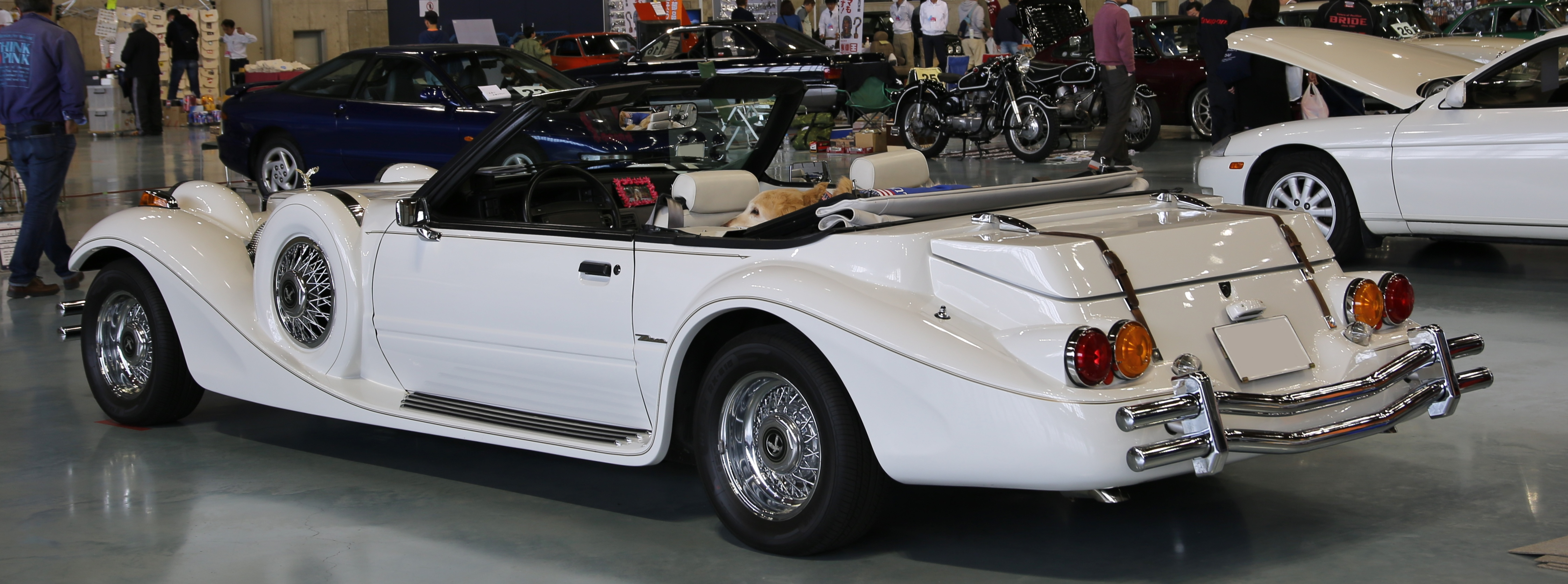 Mitsuoka Dore